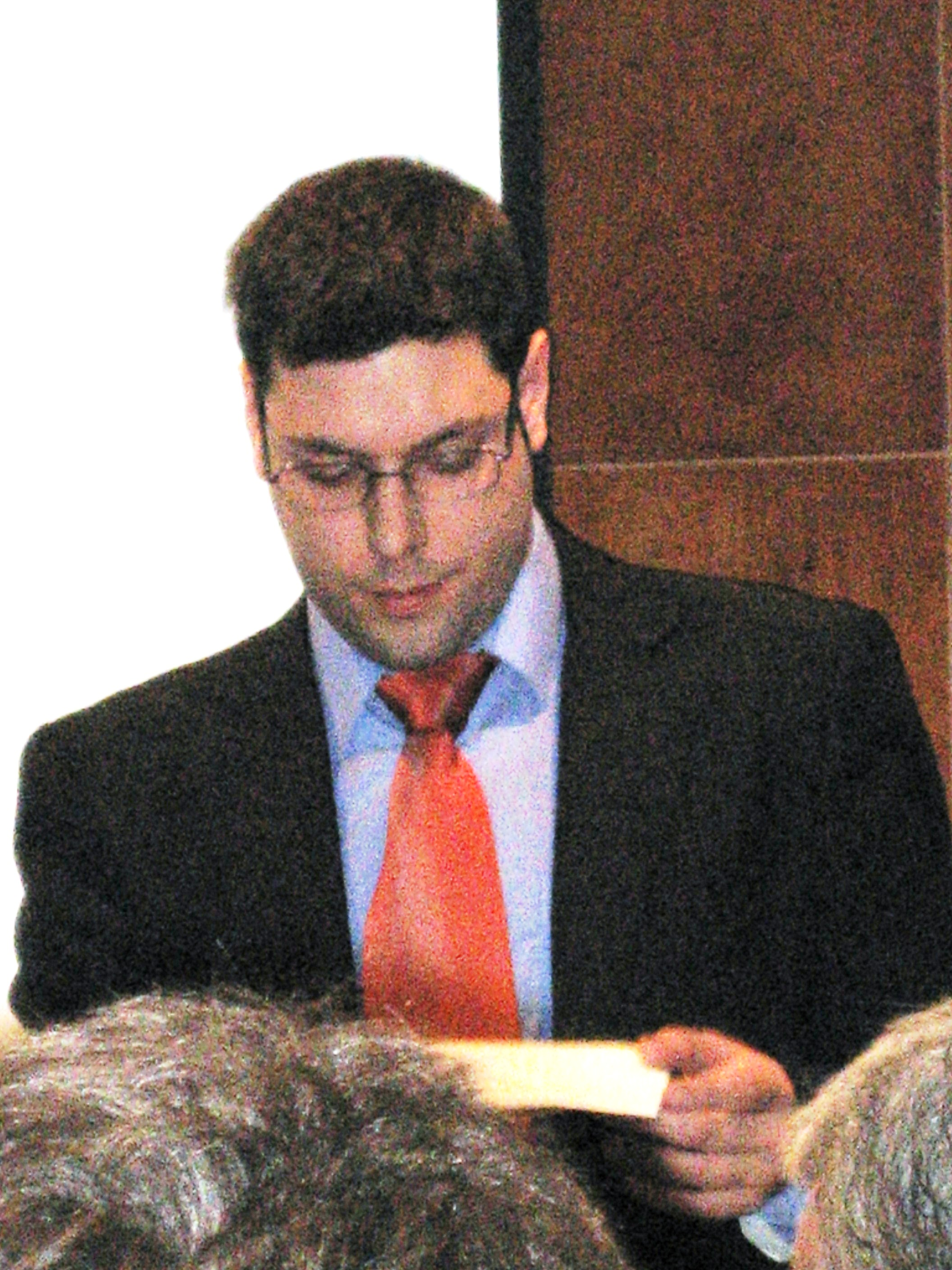 Iván Alonso Secretario General del Partido de El Bierzo